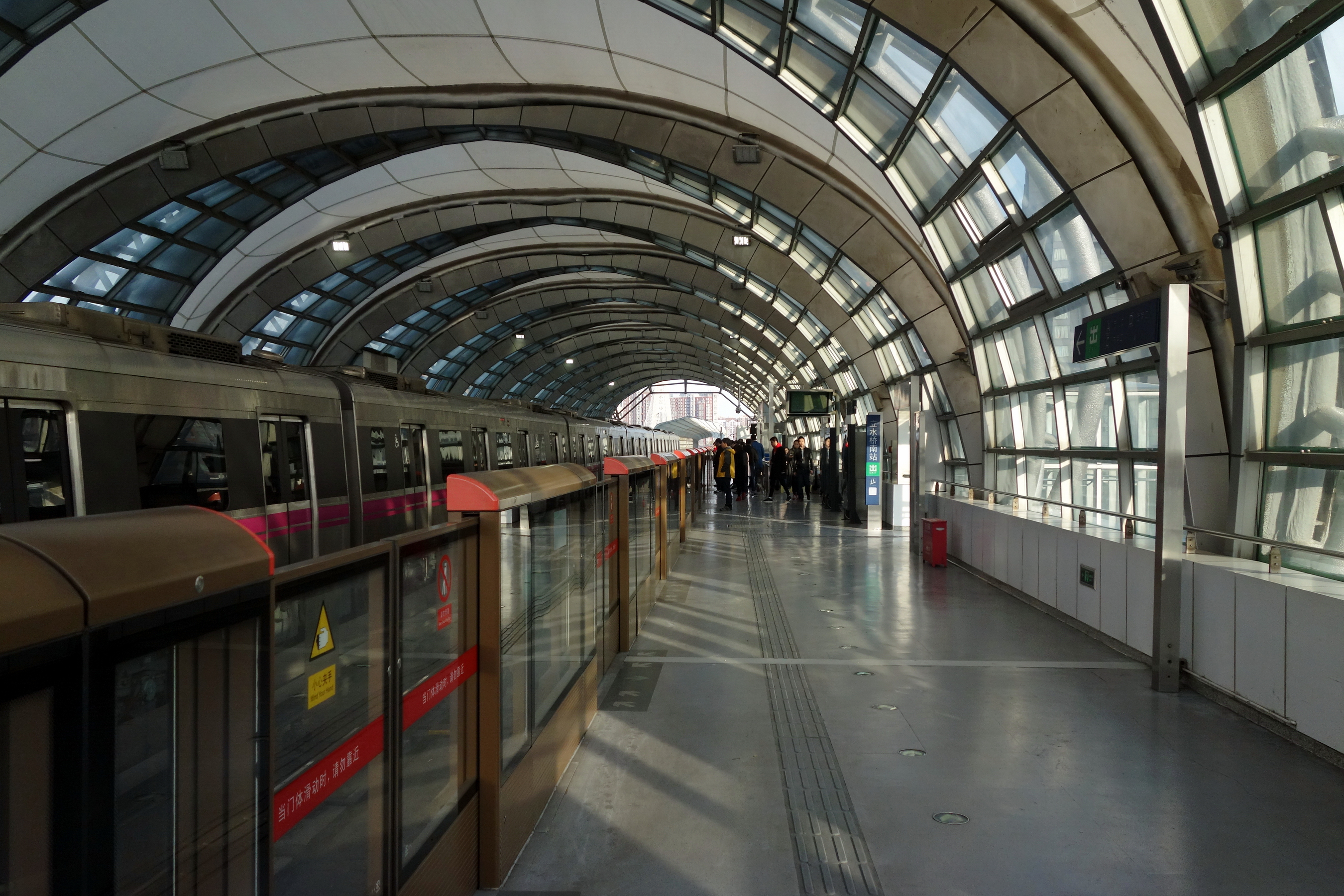 北京地铁5号线立水桥南站侧式站台